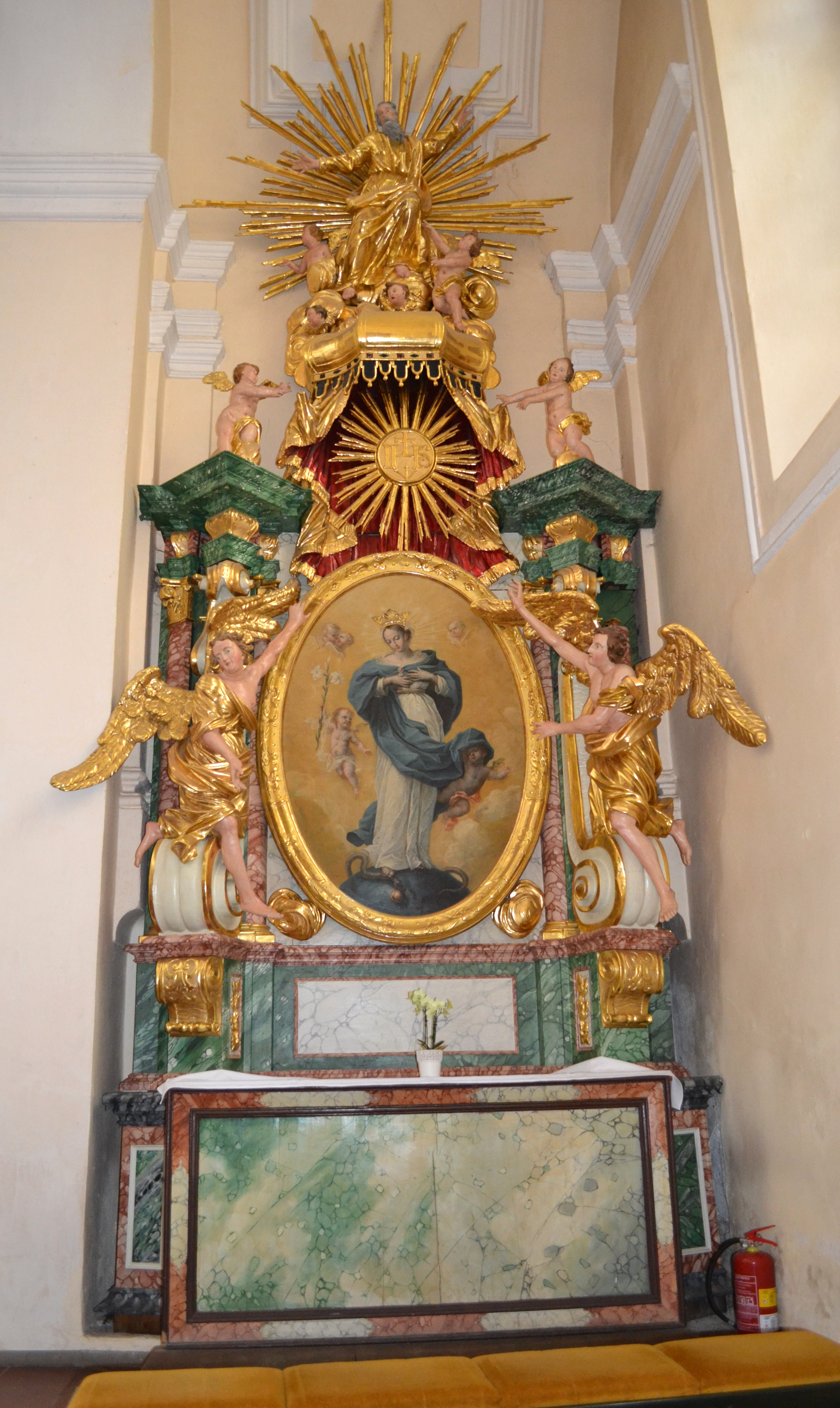 Oltár Panny Márie v kostole svätého Antona Padovského v Košiciach